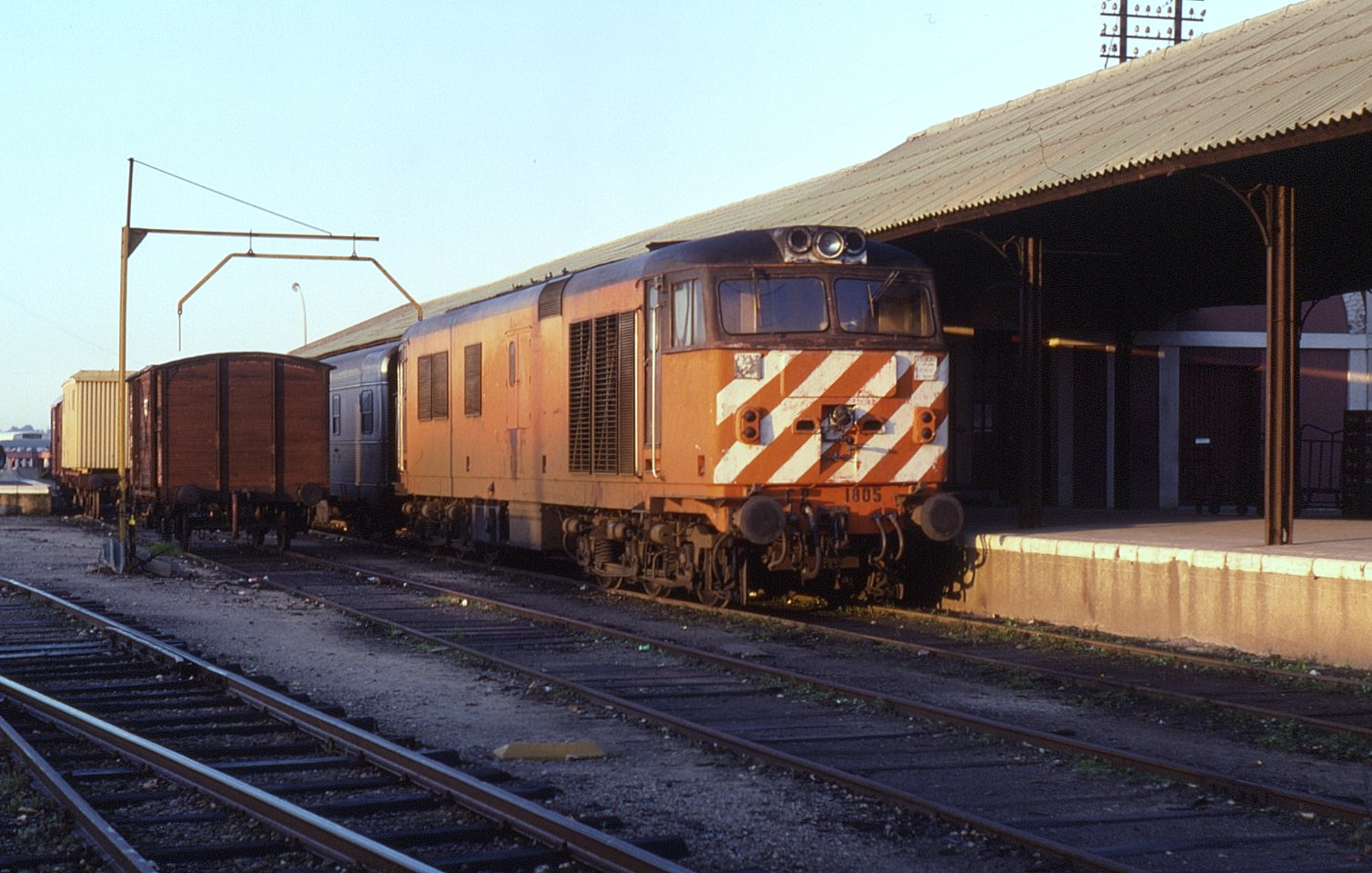 Class 1801 no. 1805 seen between duties at Barreiro on 27 November 1990.